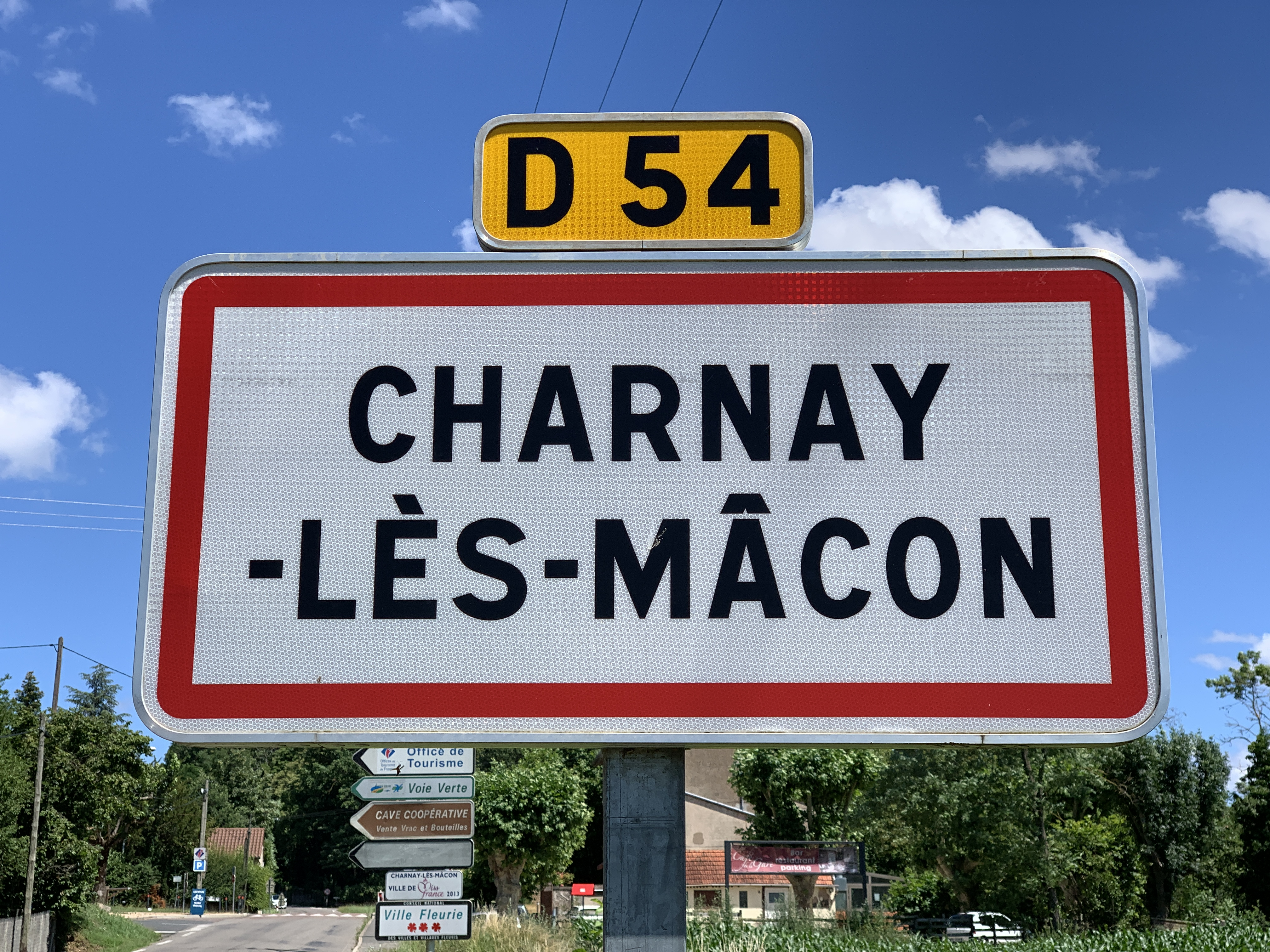 Panneau d'entrée dans Charnay-lès-Mâcon.